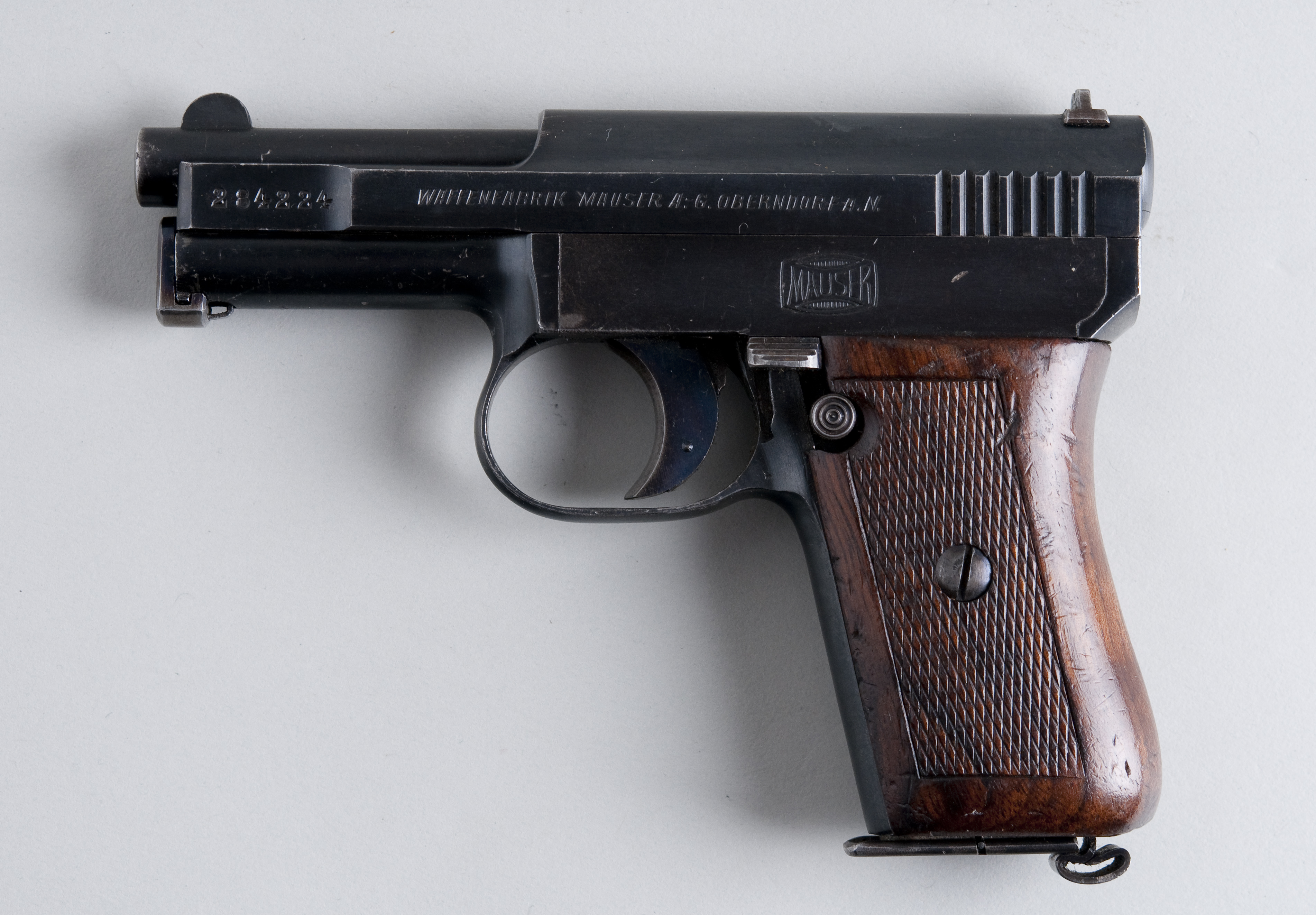 Mauser M1910 From flickr user handvapensamlingen - Pistols used in Norway.